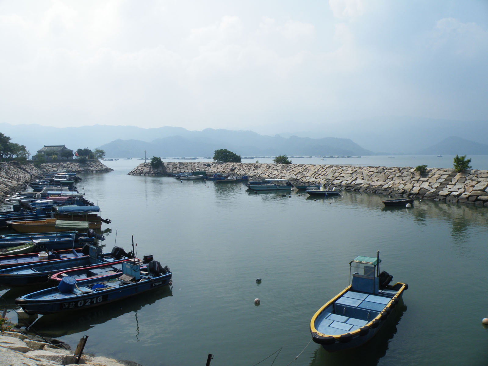 Starling Inlet, Sha Tau Kok